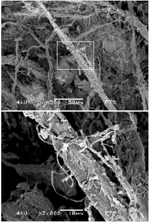 ERM Bild einer untraschall-behandelten, stark fibrillierten Hanffaser SETRALIT